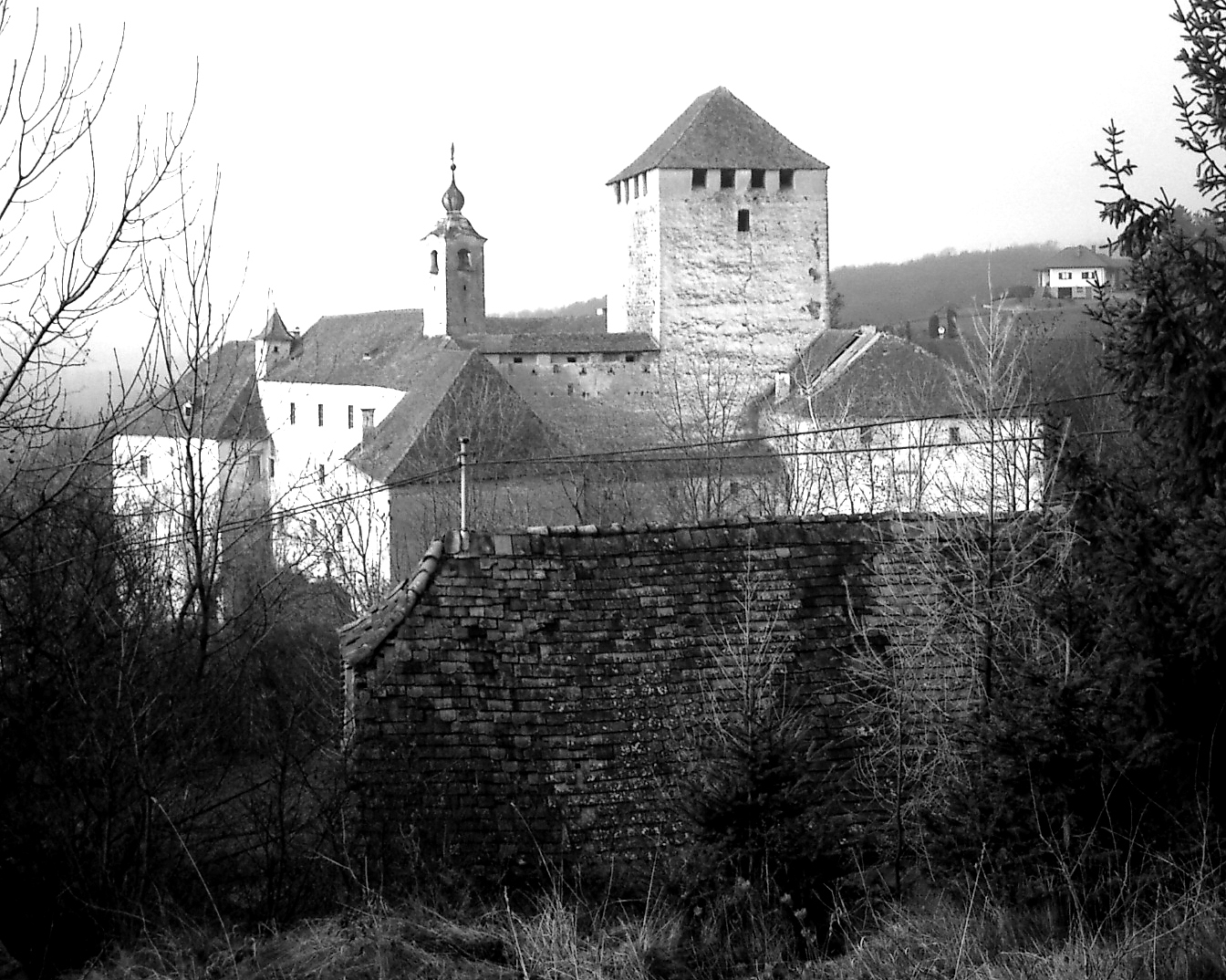 Burg Neuberg